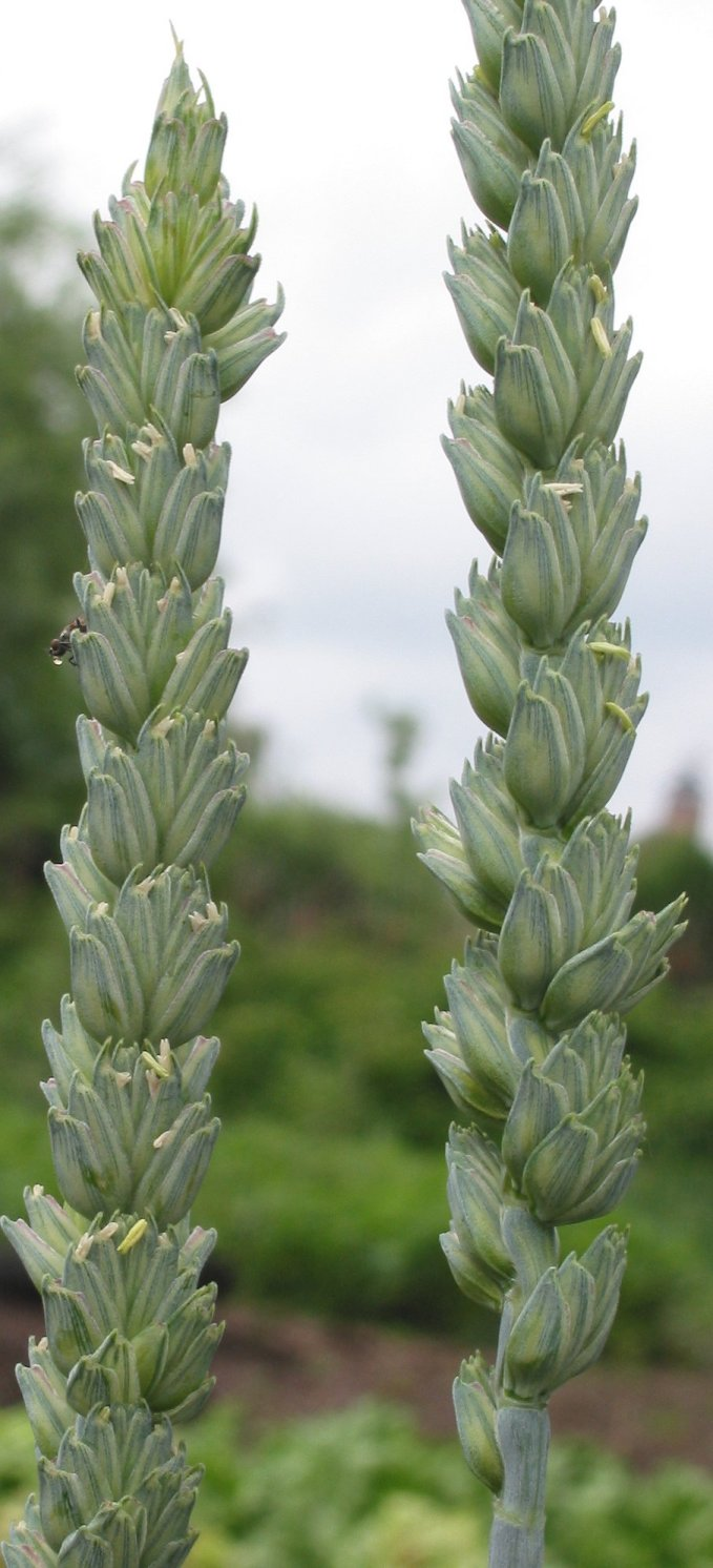 Triticum aestivum (Tarweaar)